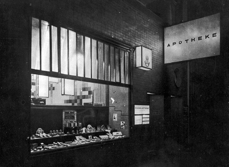 Mohren-Apotheke, Adolf Rading, Wrocław — Foto Marburg, Aufnahme-Nr. KBB 8.989;; Aufn.-Datum: 1885/1920; Repro (1977/1982)